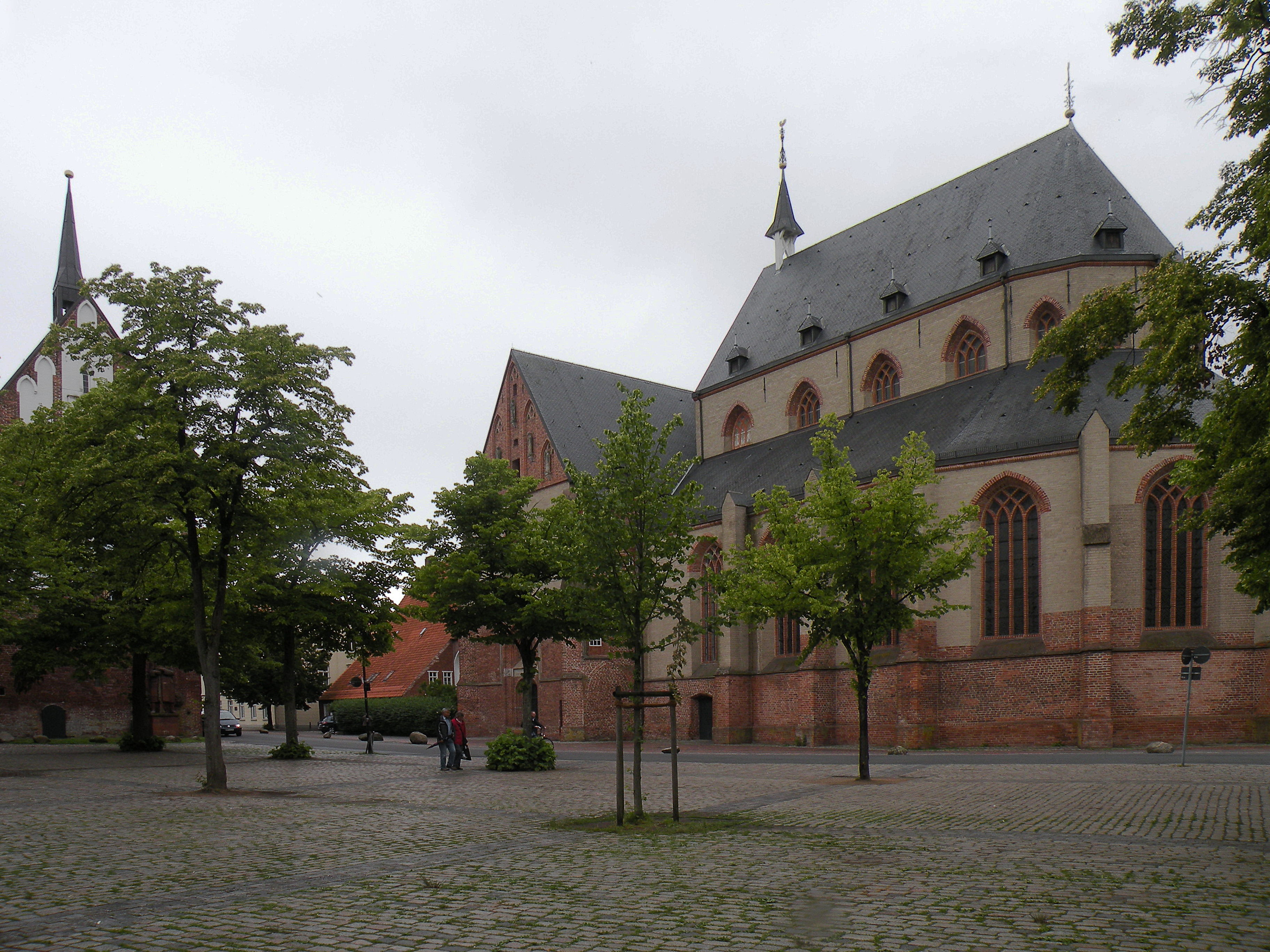 Bell tower and ev.Ludgeri church.Norden.(Ostfriesland)